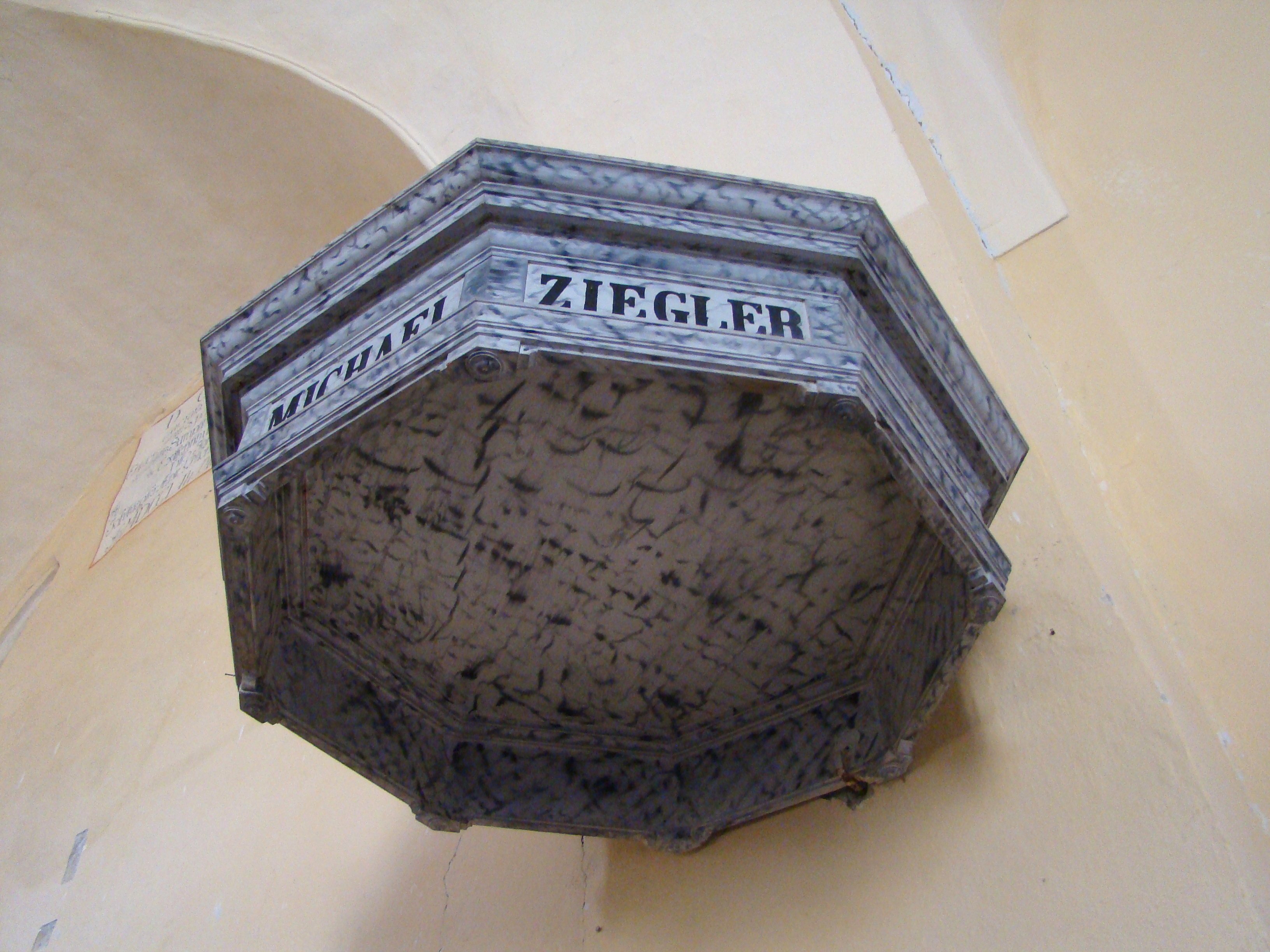 Biserica evanghelică, sat Rodbav; comuna Șoarș 115 sec. XIII-XIX